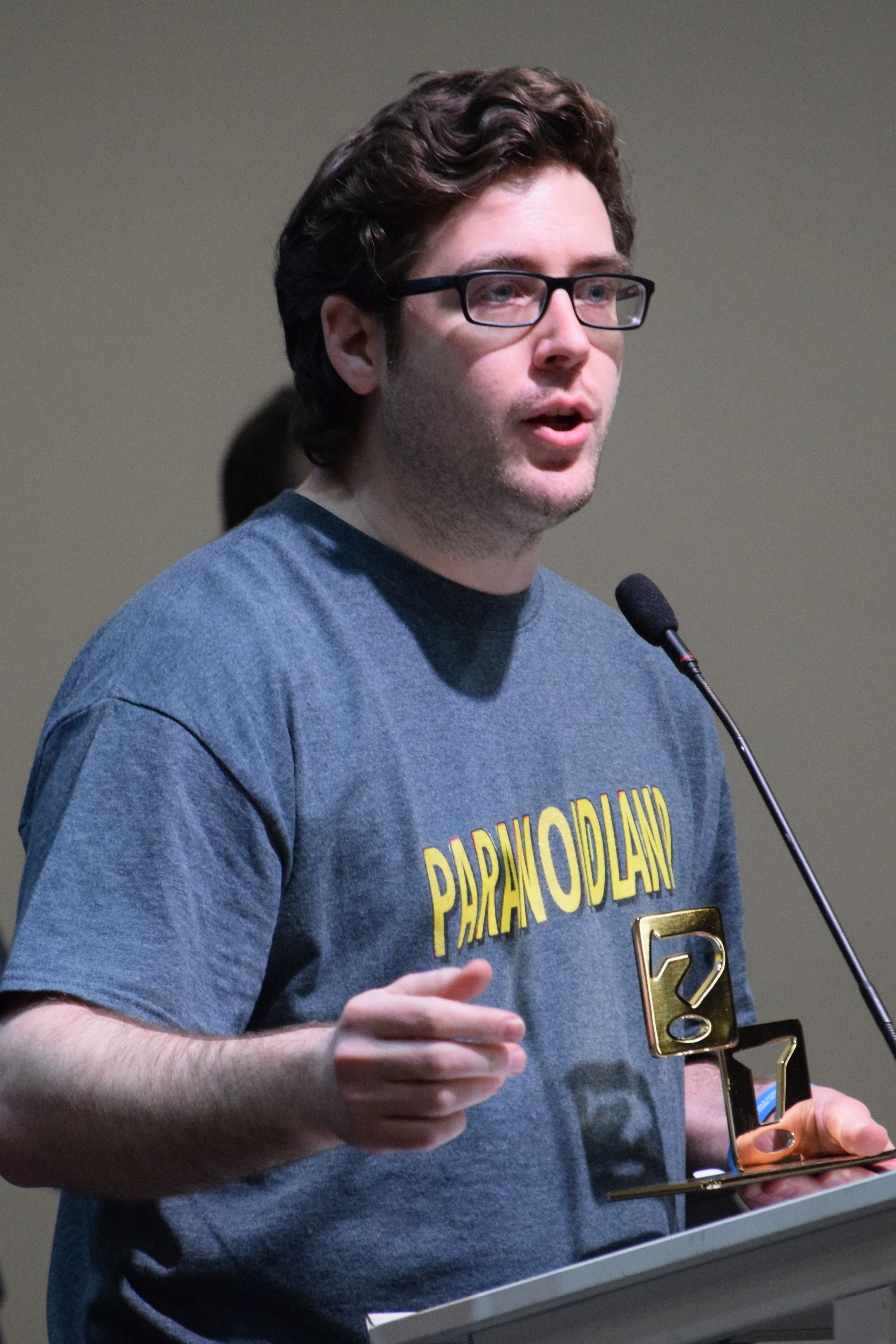 Bouman del fanzine Paranoidland fent un discurs al haver guanyat el premi al Millor fanzine. Saló Internacional del Còmic de Barcelona de 2017. Divendres 31 de març de 2017.